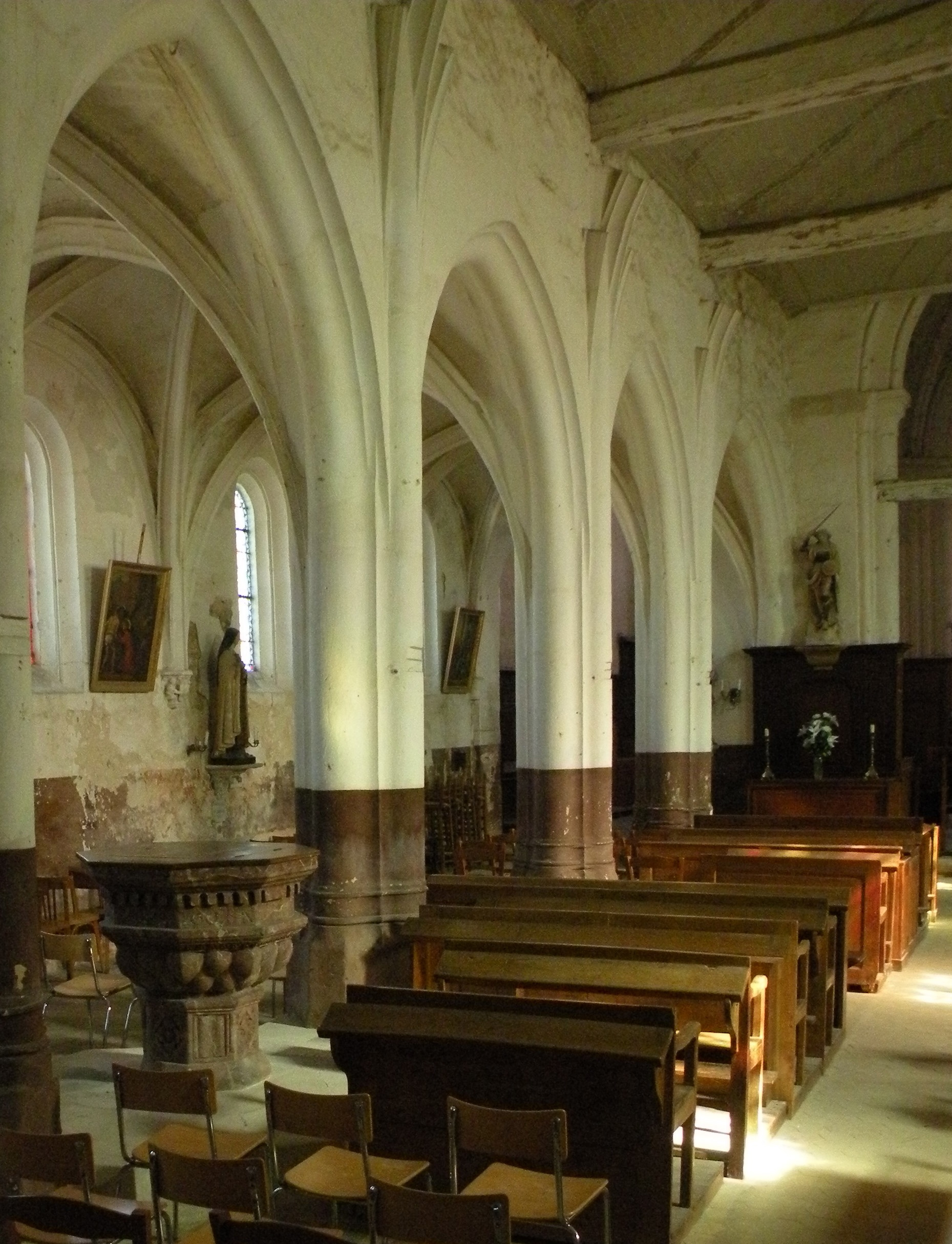 Église Saint-Martin de Lierville